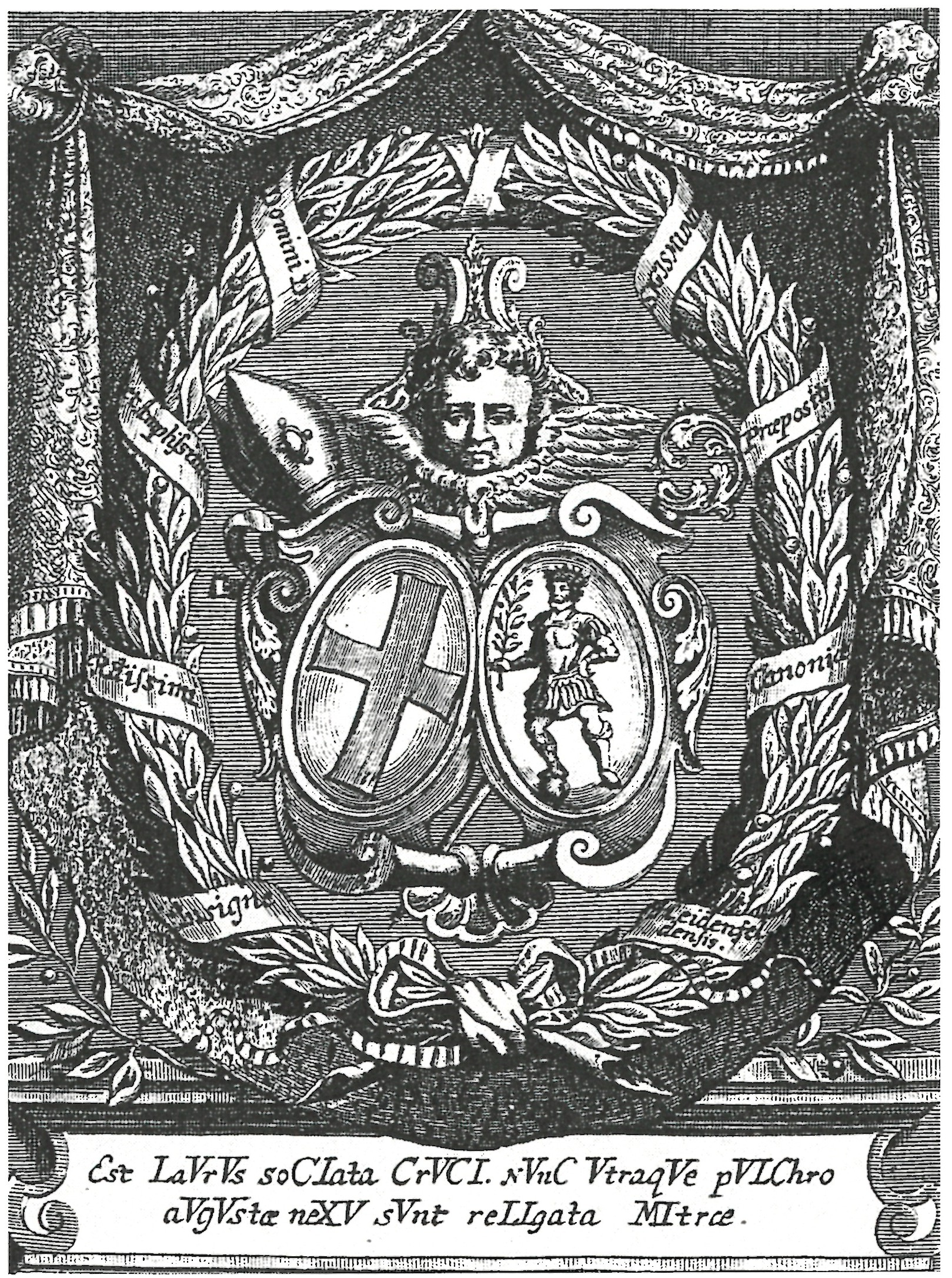 Wappen Propst Sigismund Derleth von Heidenfeld und das Stiftswappen, Blasonierung: Stehende, männliche Figur, mit einem Lorbeerzweig in der rechten Hand, den rechten Fuß auf einer Weltkugel. Kupferstich, 1719.